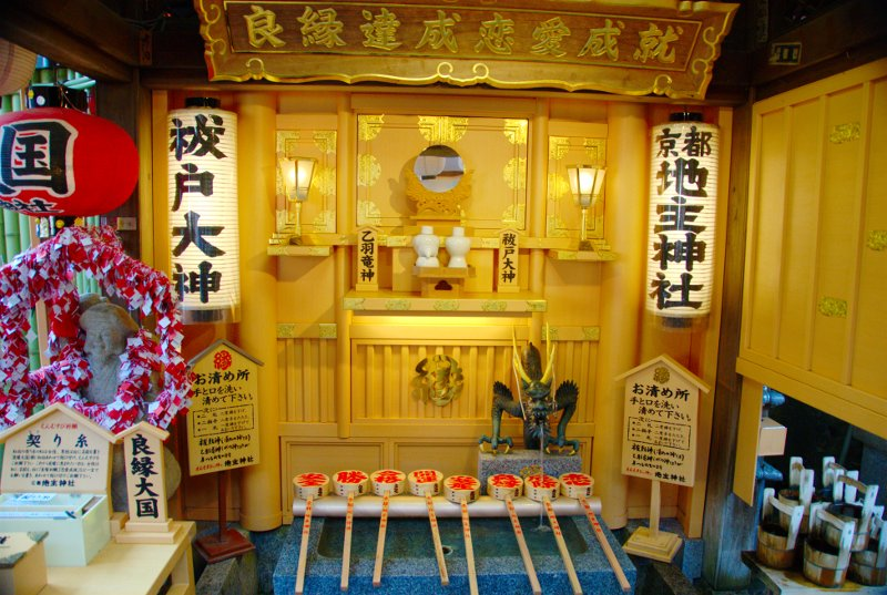 kiyomizu4